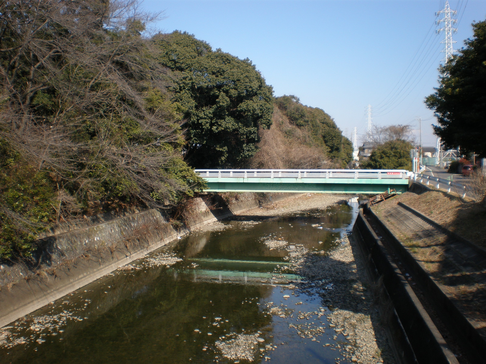 愛知県北部を流れる合瀬川（撮影場所：愛知県小牧市堀の内）